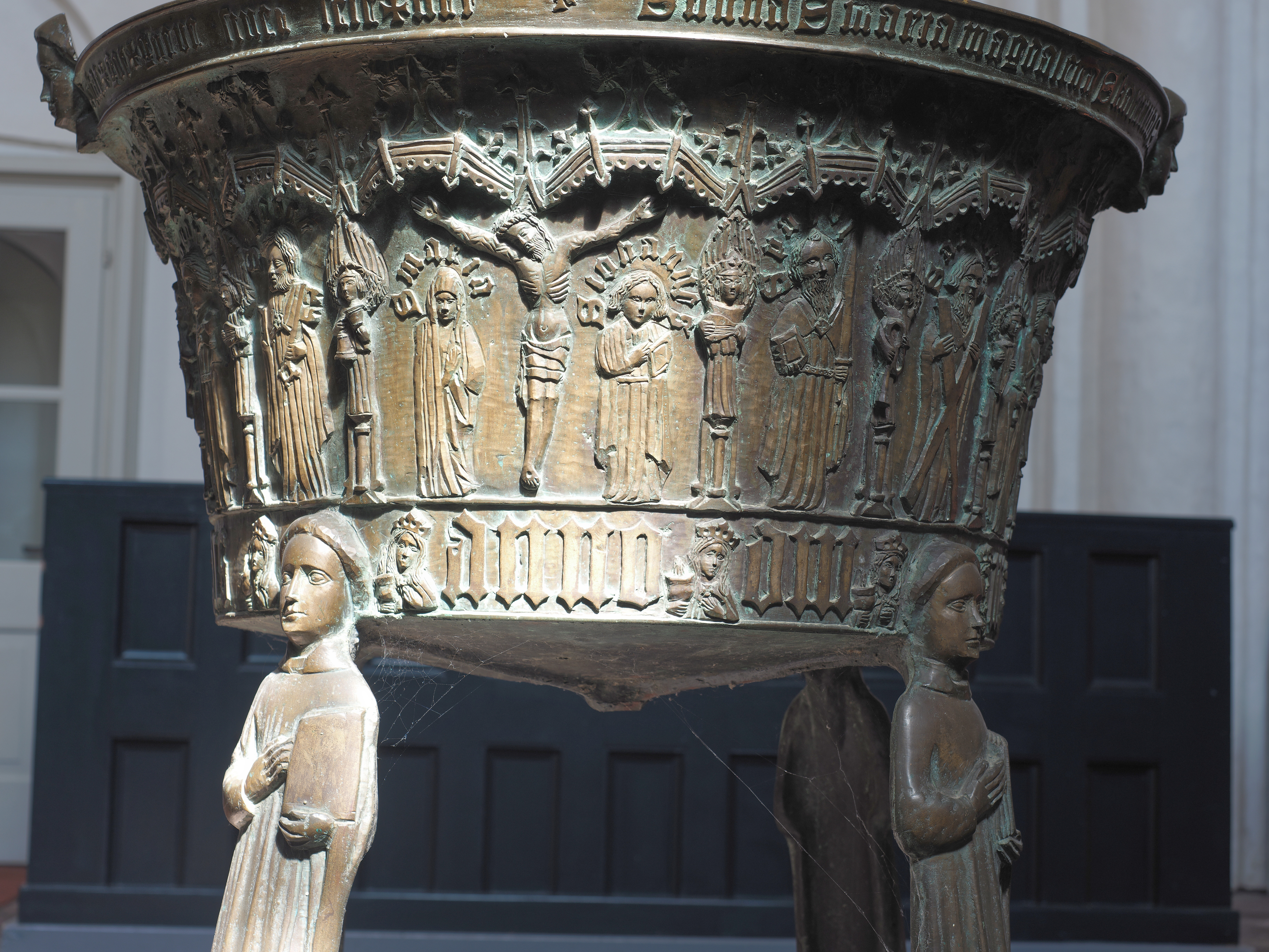 Gotisches bronzenes Taufbecken gegossen von Barthold Klinghe d. Ä. in der ev. reformierten Kirche in Eilsum (Ostfriesland) aus dem Jahr 1472. Ansicht von Osten.